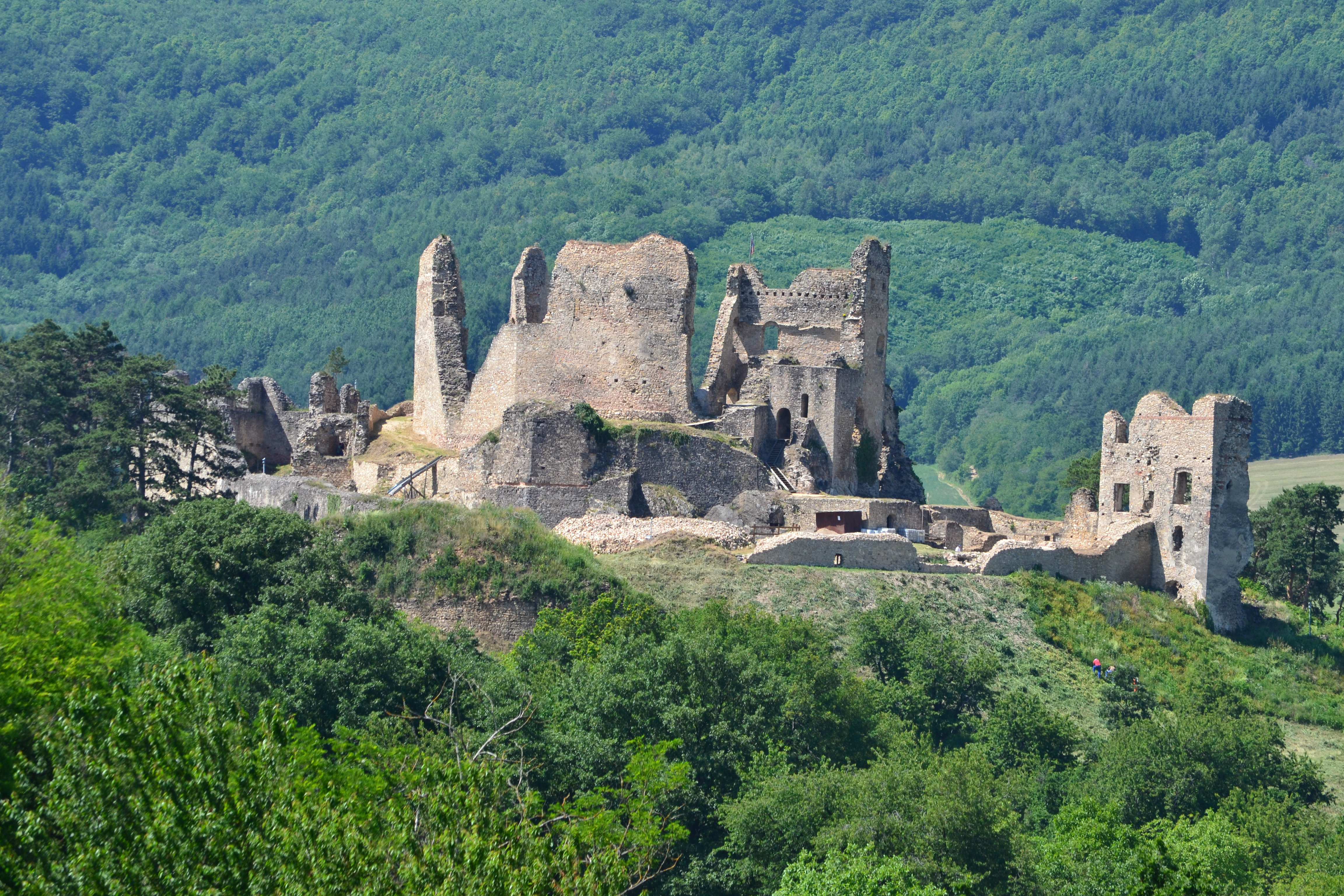 Divínsky hrad postavili koncom 13. storočia